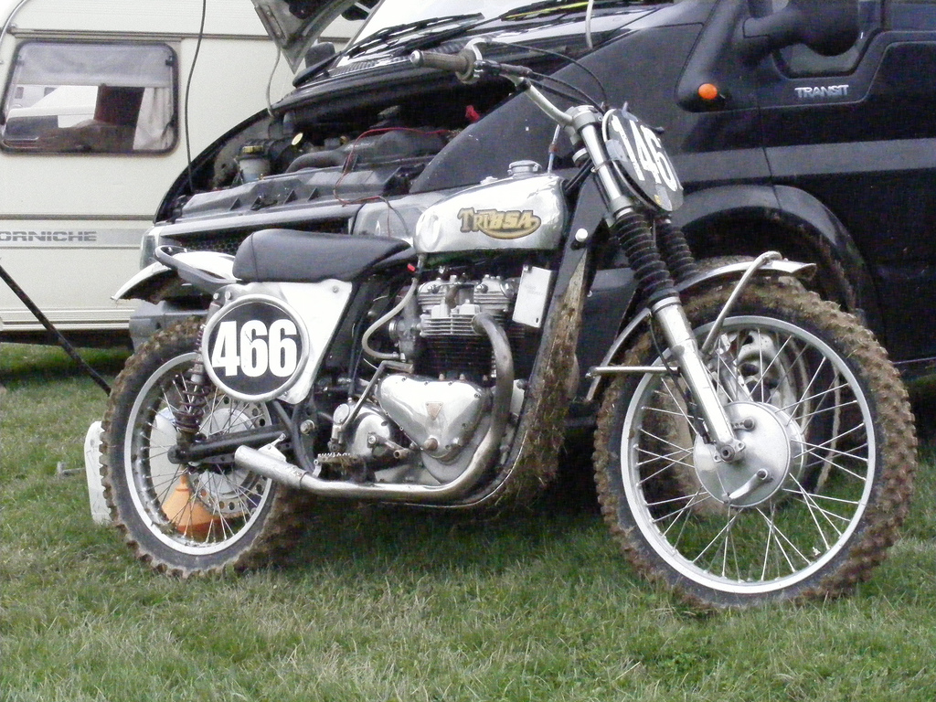 TriBSA 466